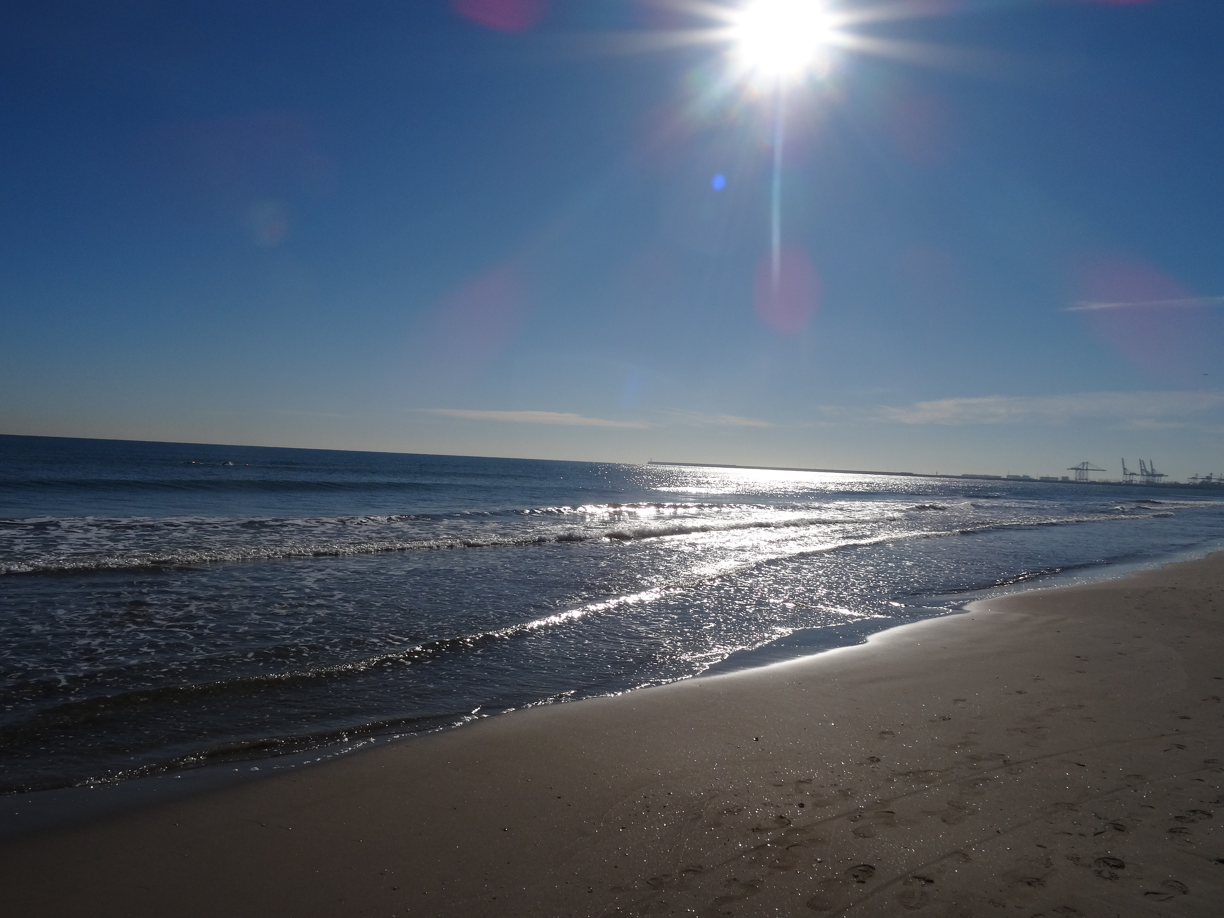 Luce el sol sobre el mar